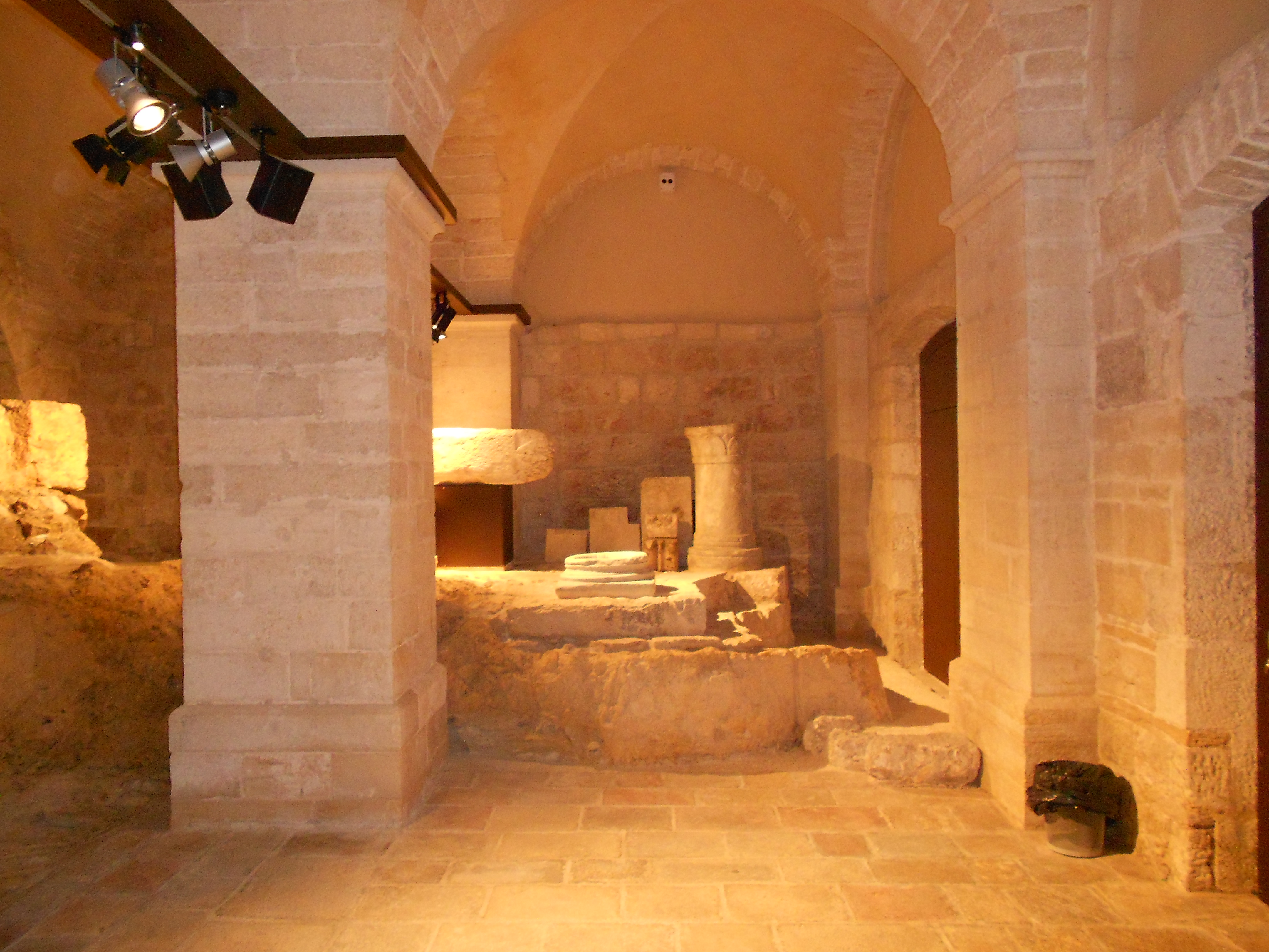 Visite du Terra Sancta Museum à Jérusalem le 13-10-2018